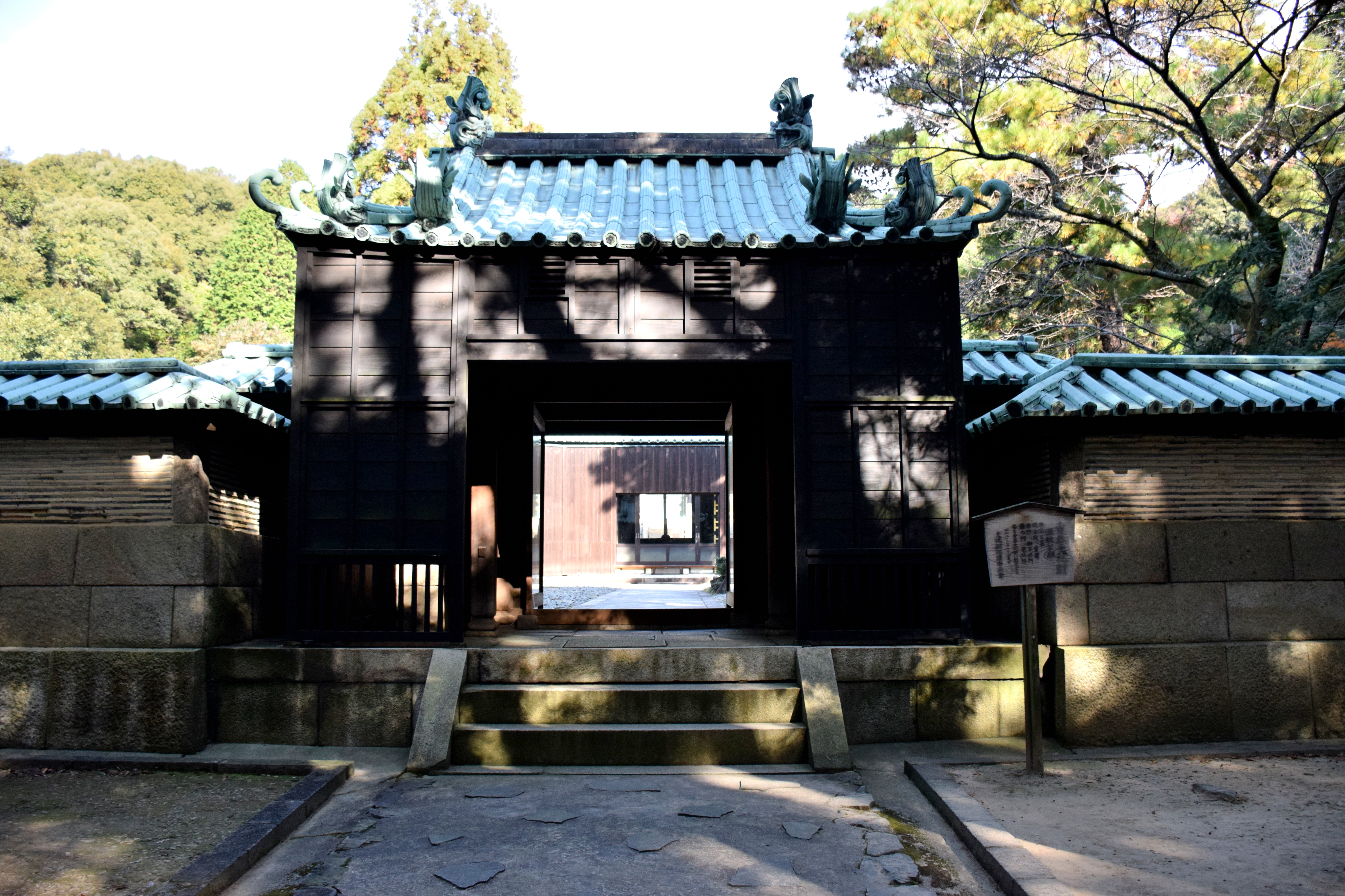 定光寺竜の門